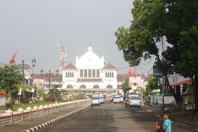 Stasiun KA Kejaksan Kota Cirebon Jln Siliwangi, Kota Cirebon, Jawa Barat, Indonesia. Date, 11 Mei 2014 Foto Dok Pribadi